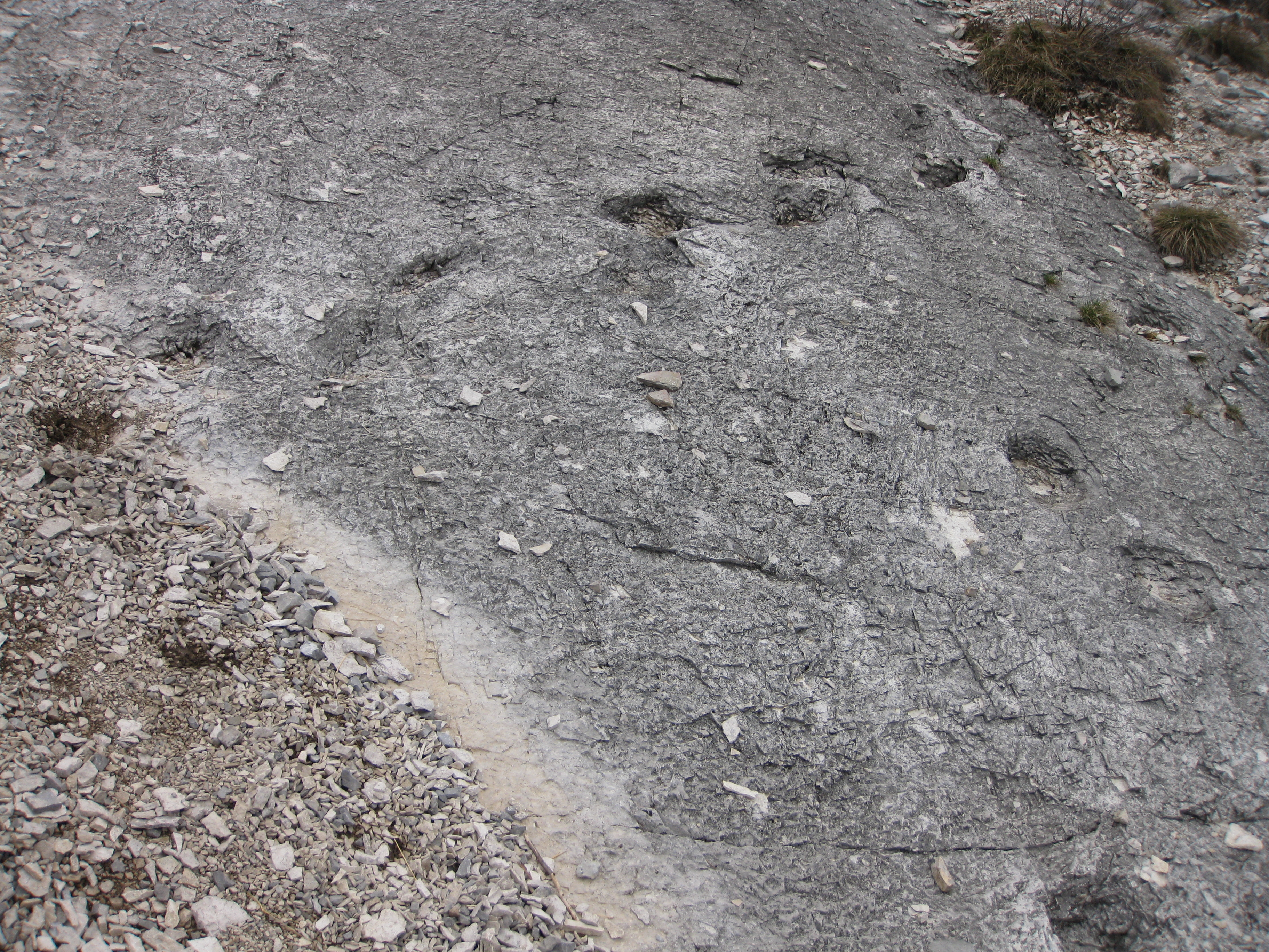 Lavini di Marco - Colatoio Chemini